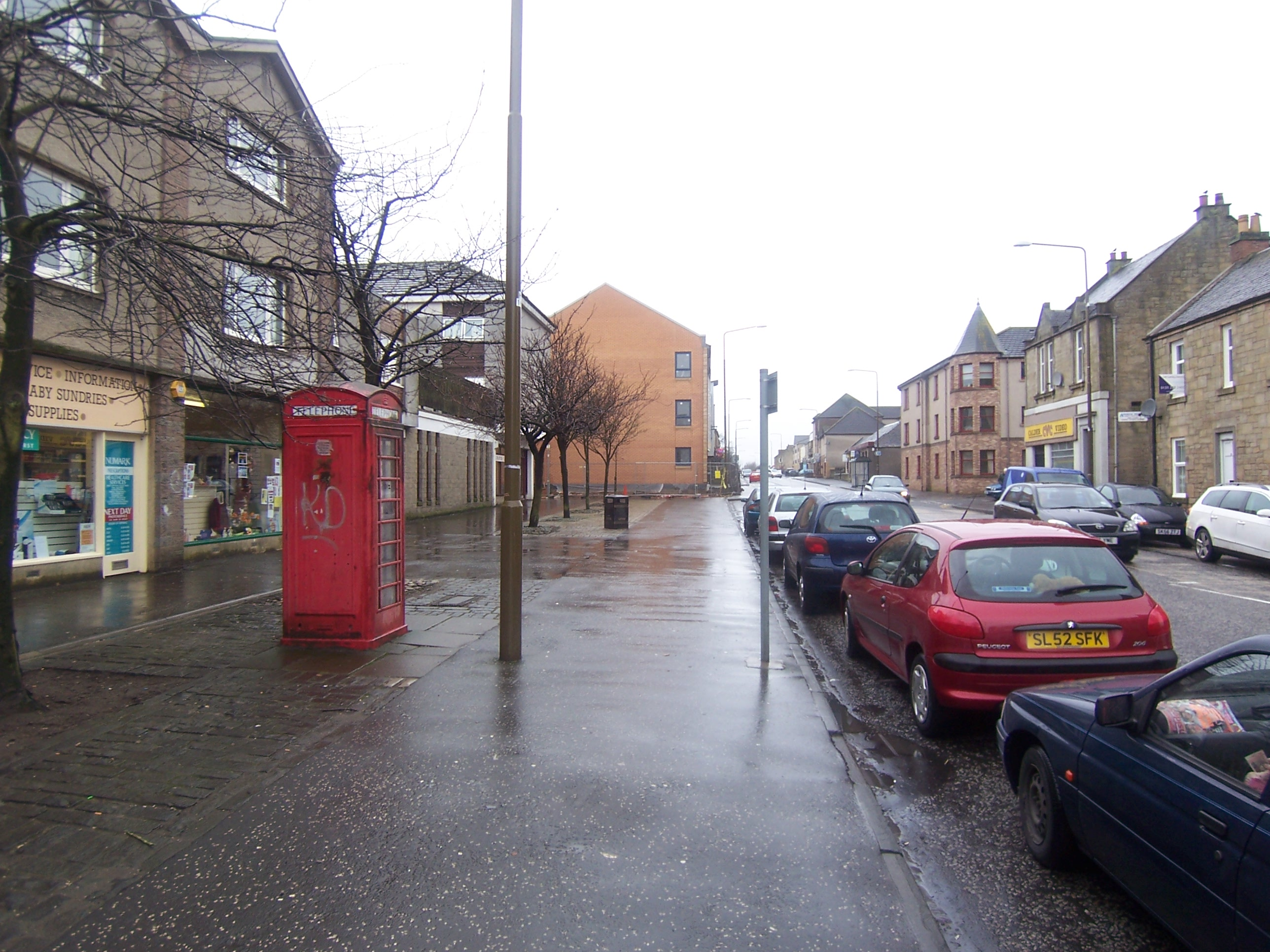 Gàidhlig: Caladair an Iar.